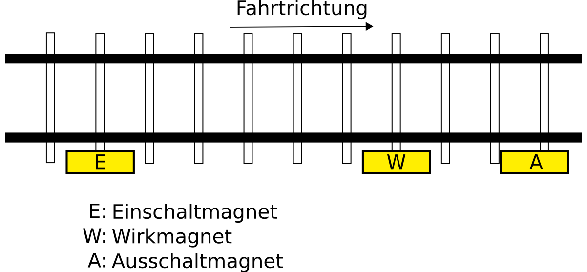 Die Skizze zeigt einer Geschwindigkeitsprüfeinrichtung, wie sie bei der Deutschen Bahn verbaut wird.